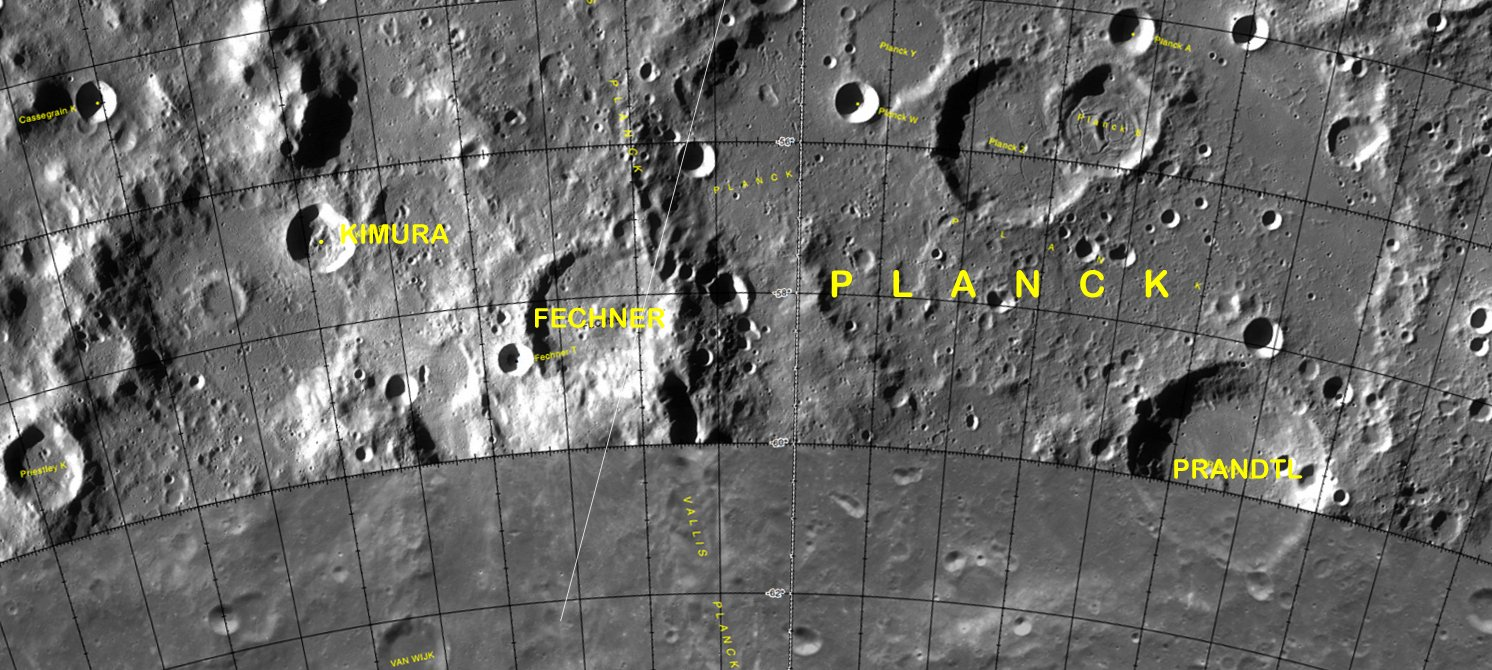 Cráter lunar Fechner. Localización. (Imagen LRO)